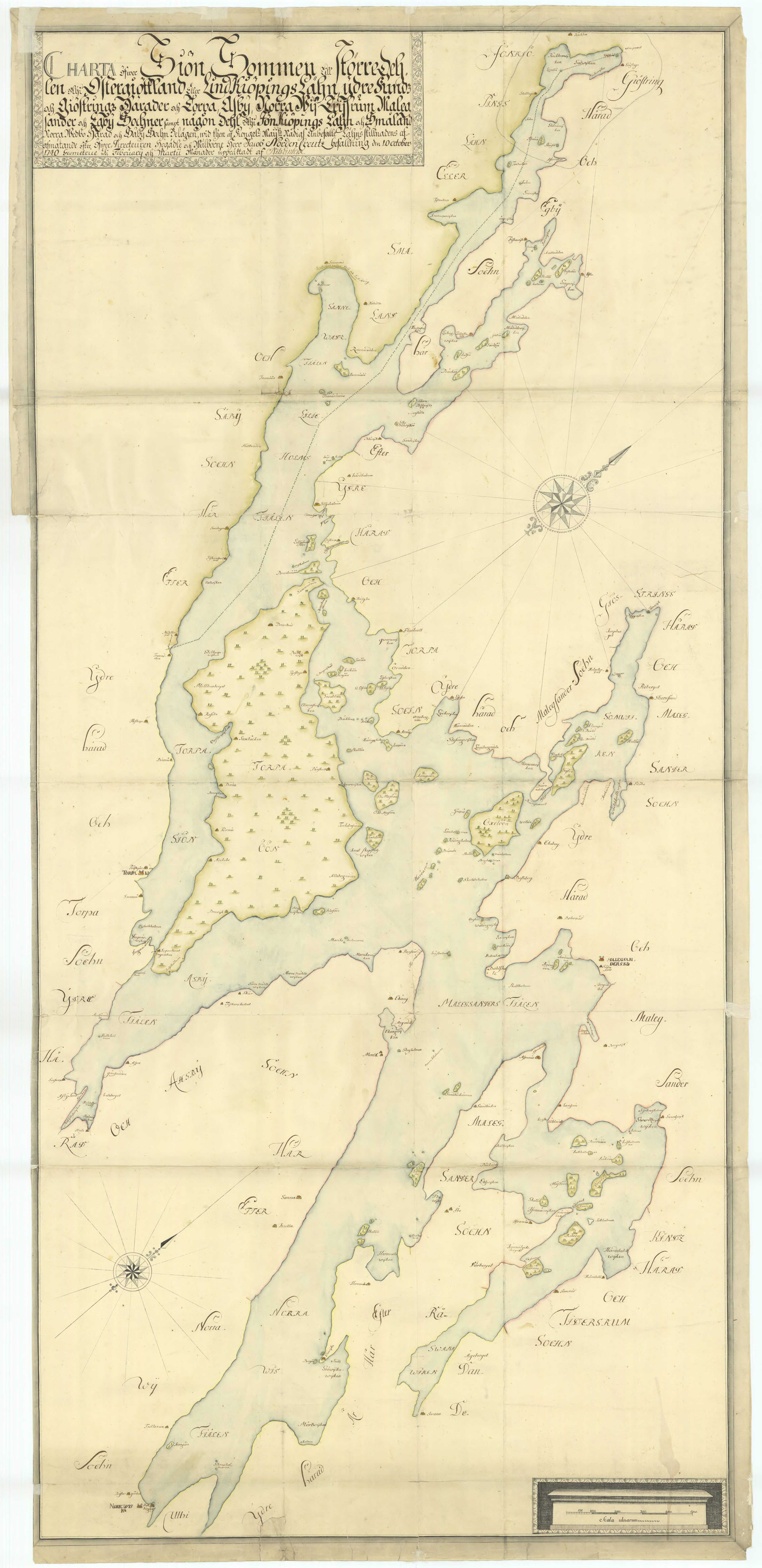 Karta över sjön Sommen av Nils Linbeck.